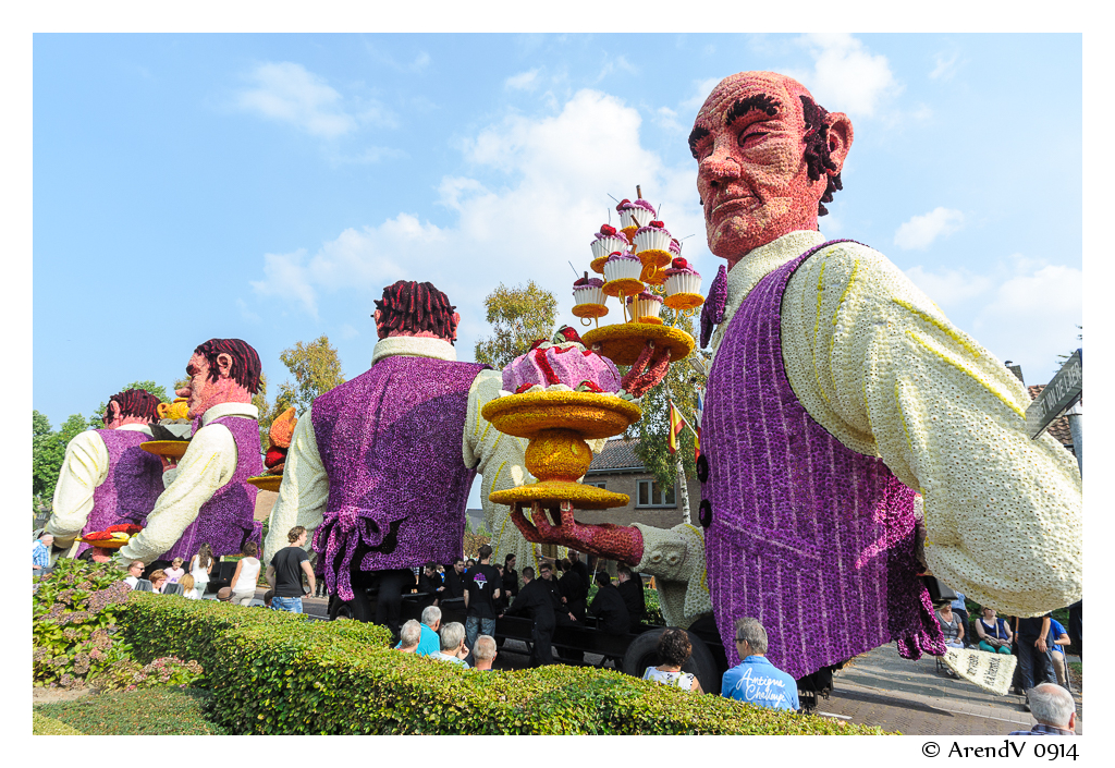 "Haute Cuisine" - 3e prijs